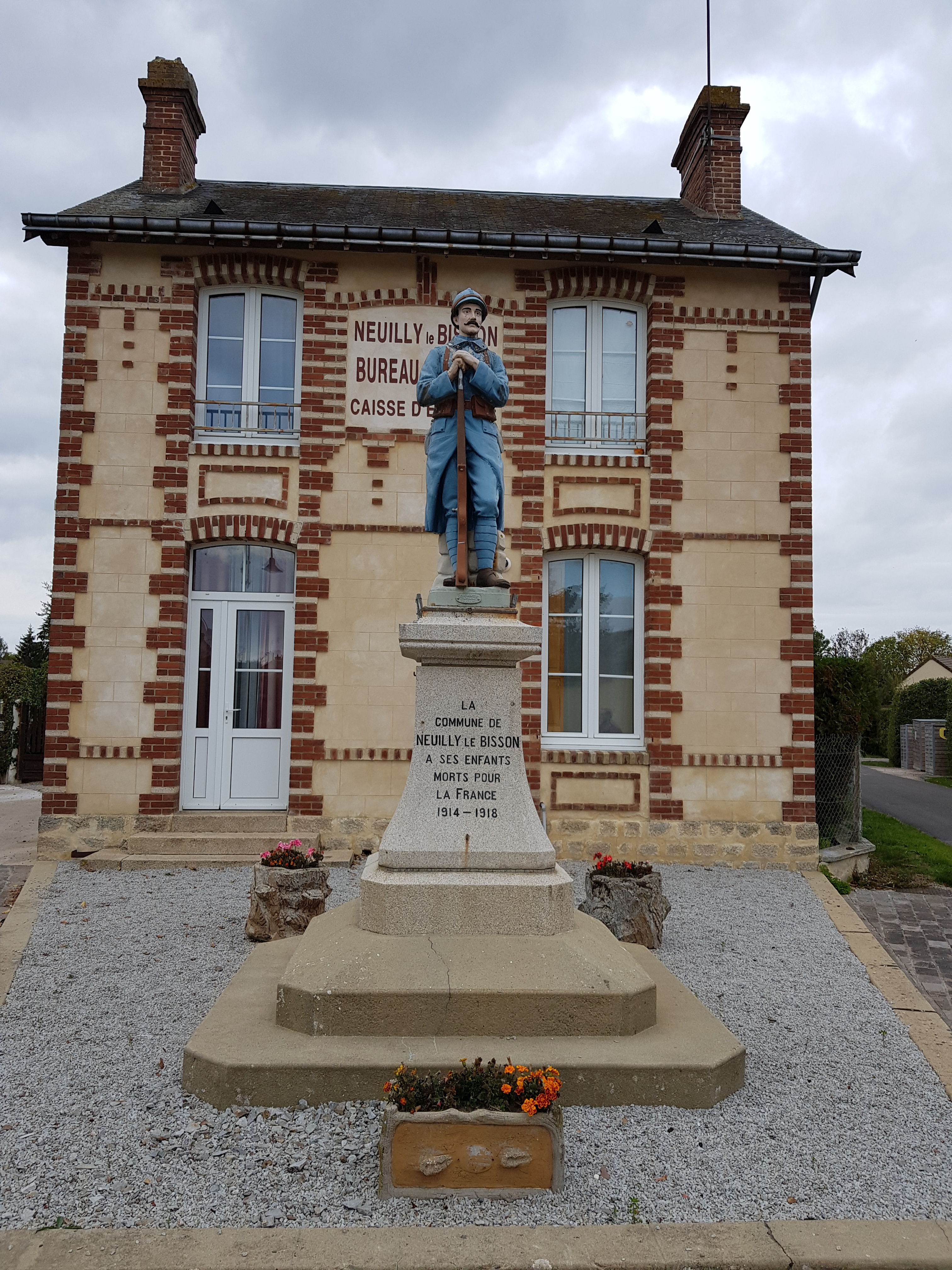 La mairie et le monument aux morts de Neuilly-le-Bisson (61).